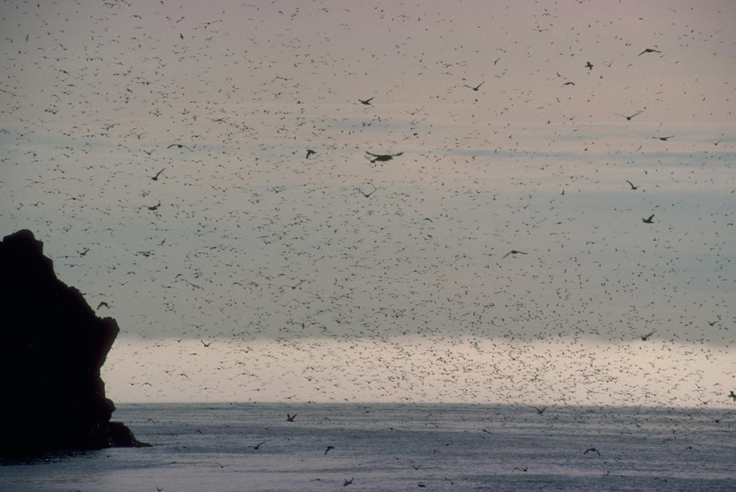 Concentration de Fulmarus glacialis (Fulmar boréal)